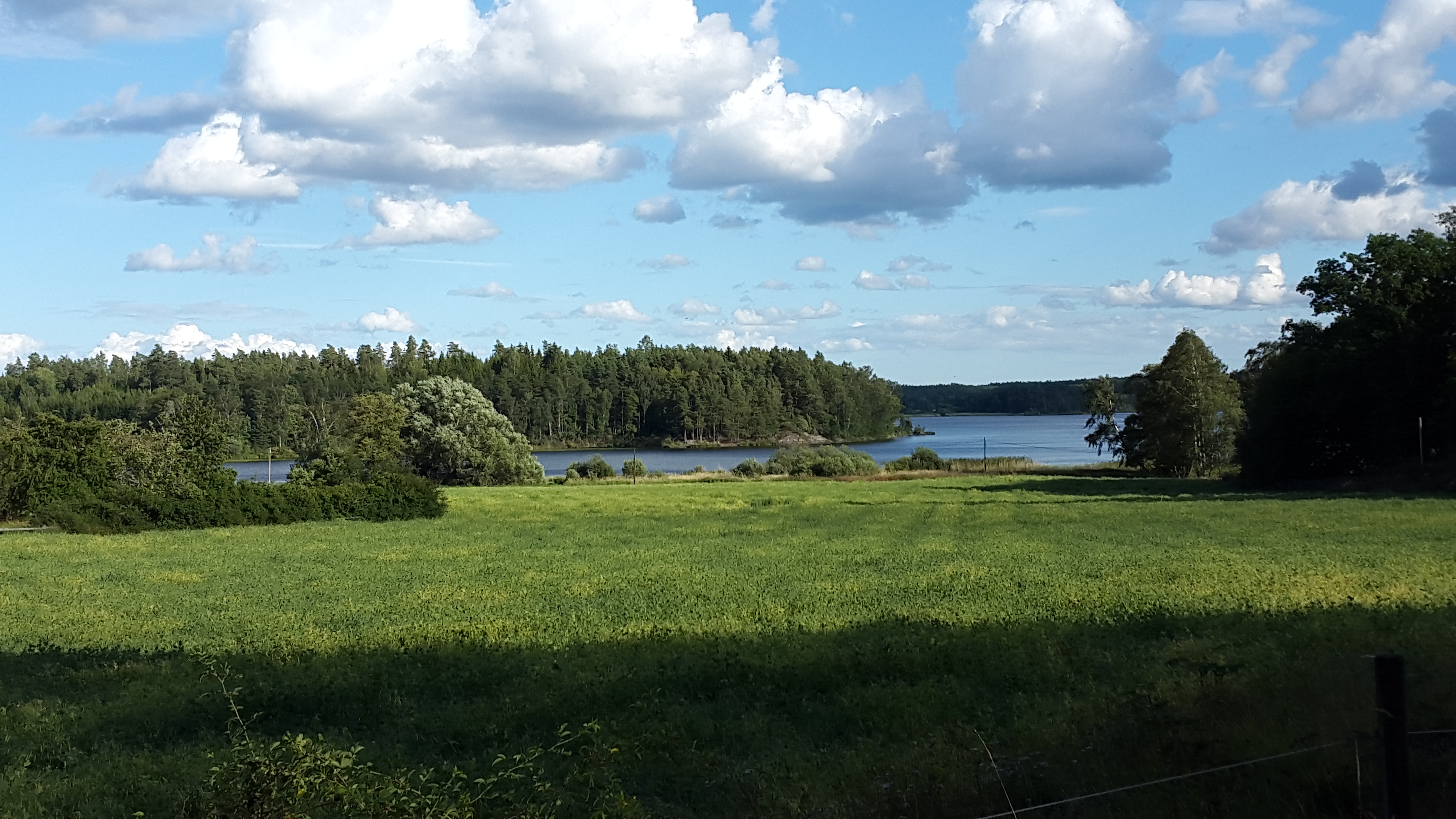 Marsjön mellan Stallarholmen och Mariefred i Södermanland. Bild från Ulriksberg